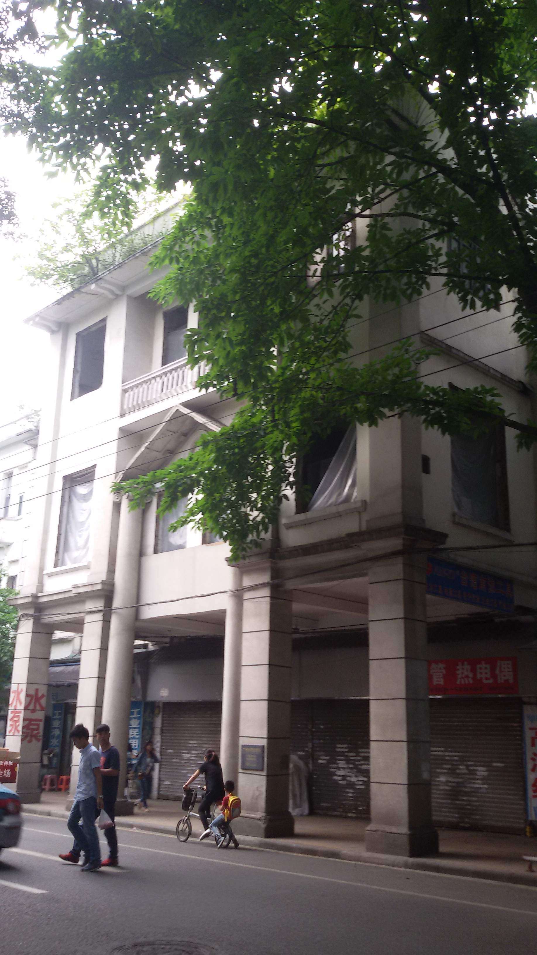 粵語: 旧时私立广东国民大学附属中学嘅一间教学楼（惠福西路街头嗰边）